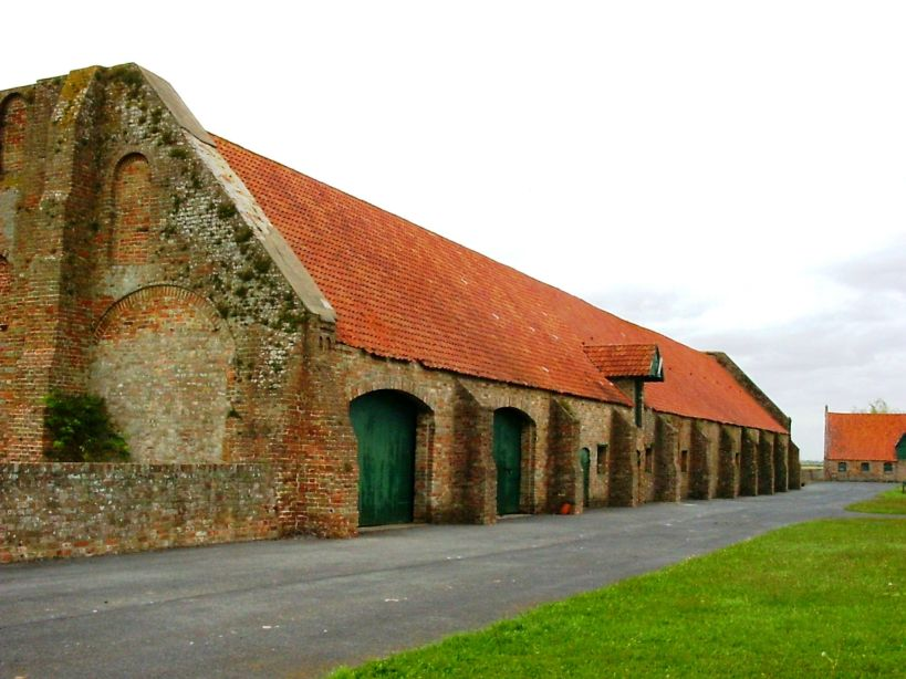 Ten Bogaerde - eigen foto